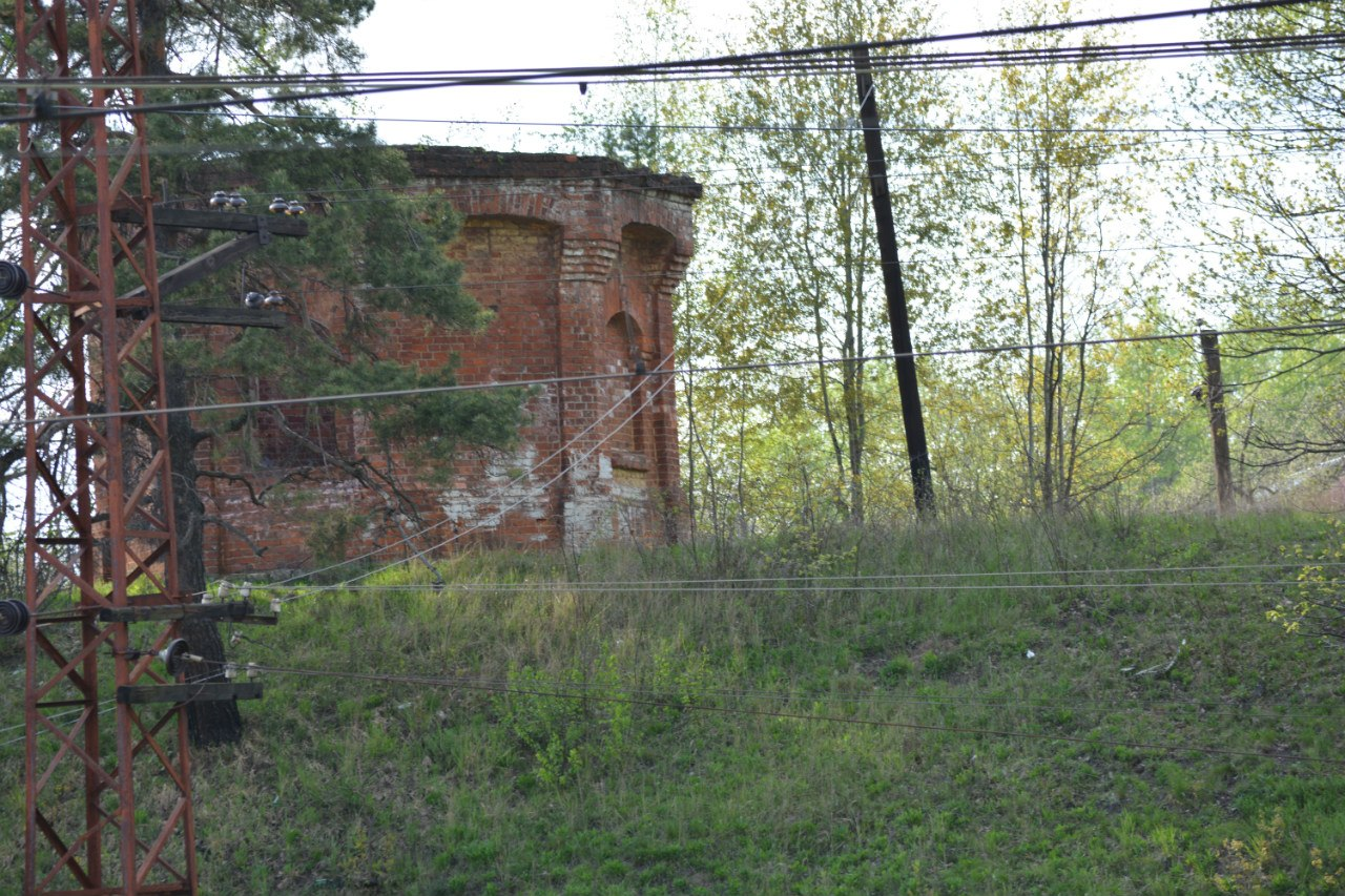 Водонапорная башня, май 2015